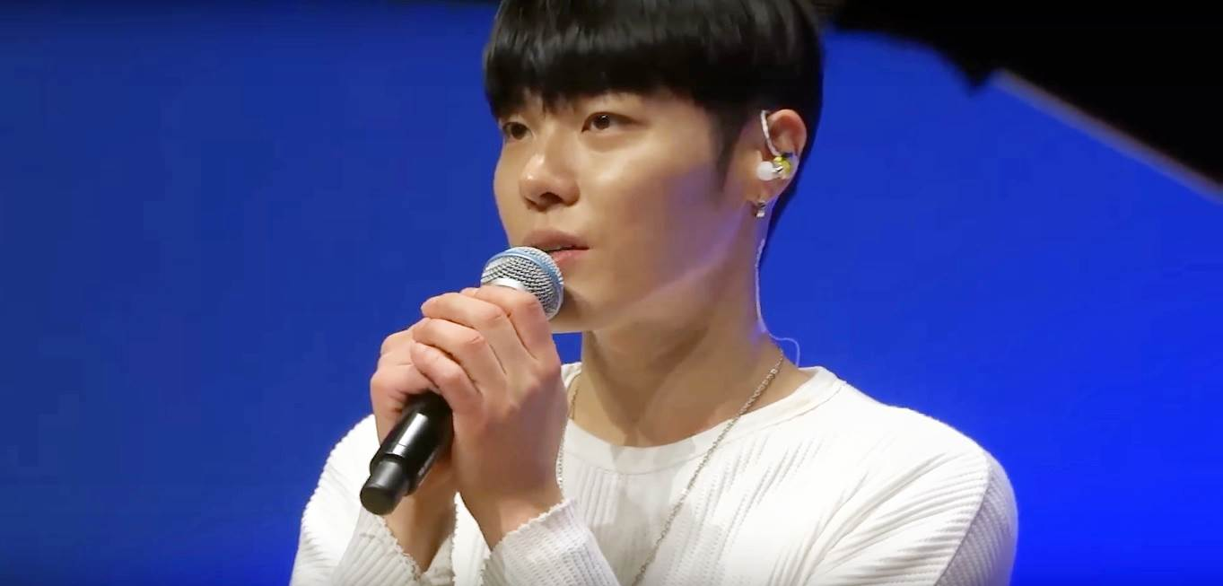 180426 Wheesung International Film Festival 2018